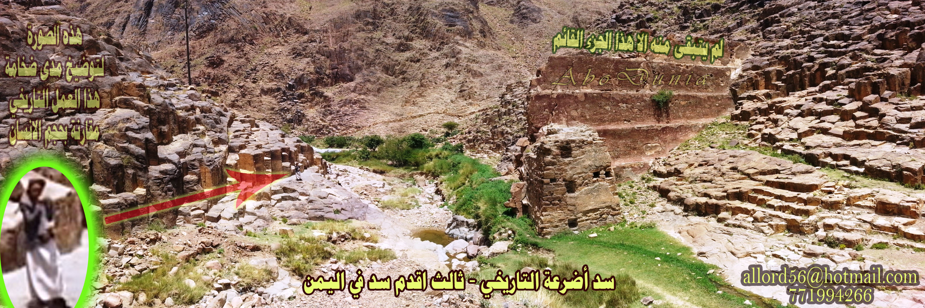 سد أضرعه هو ثالث أقدم سد في الجمهورية اليمنية ويعتبر أهم ما يميز محافظه ذمار يقع في قرية أضرعة المنطقه السياحية والحضارية وهى من أهم القرى في محاظه ذمار حيث تبعد حوالي 30 كم عن مدينة ذمار وتعد من أهم المناطق المنتجه للخضروات والفواكه والحبوب وتتمع بمناضر خيالية وجذابه وتقع بين سدين السد الكبير على اليمين "سد النقعة"الذي هو قديم ولا زالت اثاره متواجده إلى الآن ويعبر عن فن الهندسه اليمينه وعبقرية العقل اليمني القديم حيث ان اليمنيين من قديم الزمان لهم الفن والاصاله في الهندسه والعمارة ويوجد له اثار تدل على عظمته وعظمت من قاموا ببناءه حتى الآن.